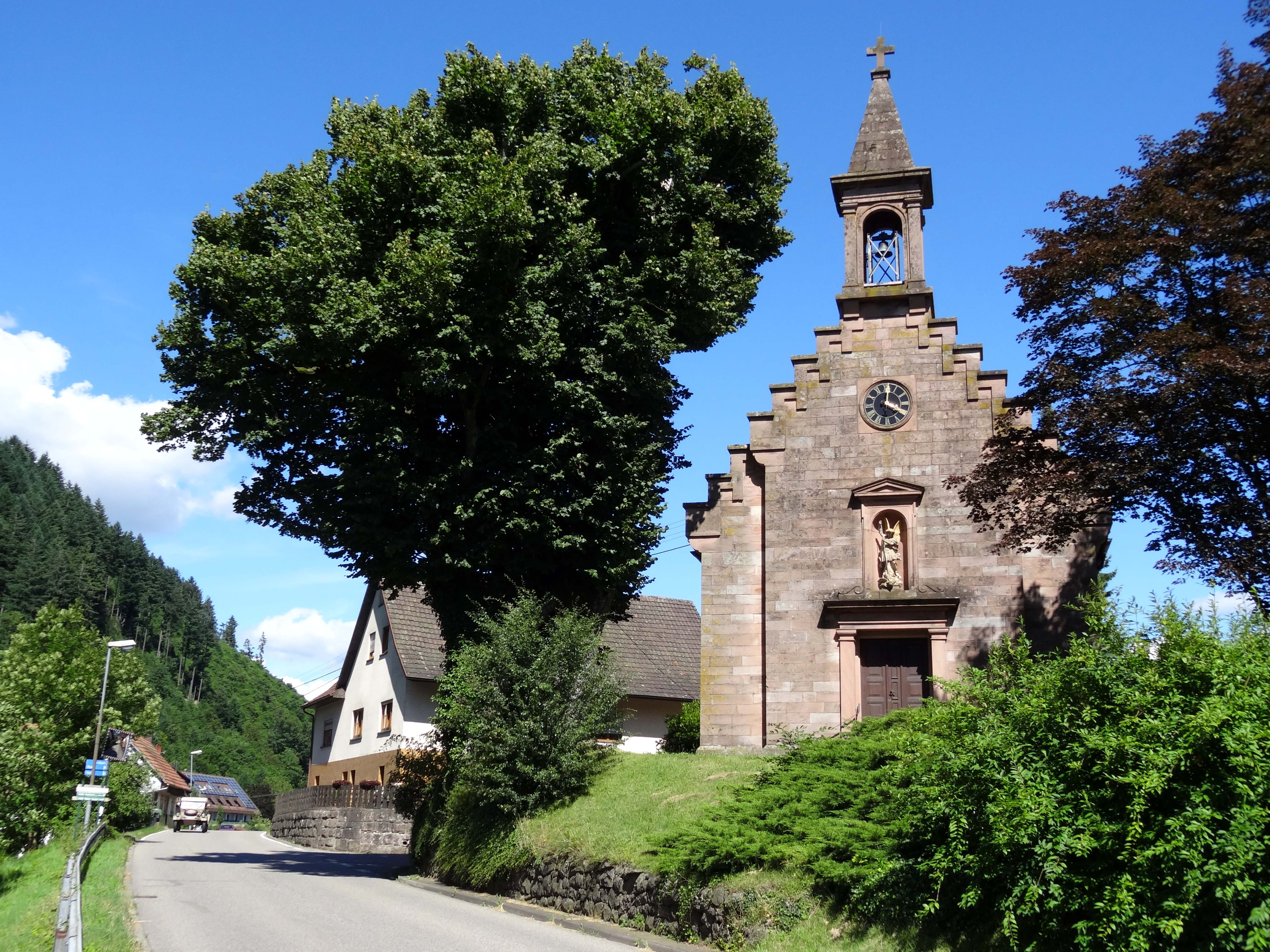 St. Michaelskapelle (Zell am Harmersbach-Grün) - siehe Bildtitel.